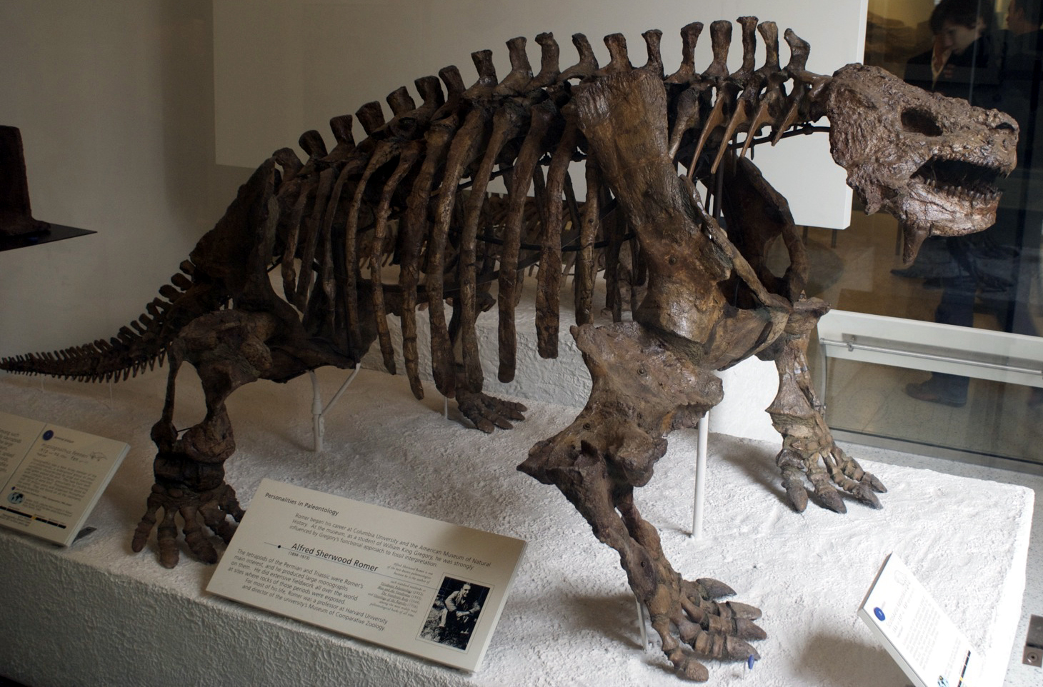 Scutosaurus karpinskii skeleton, American Museum of Natural History.